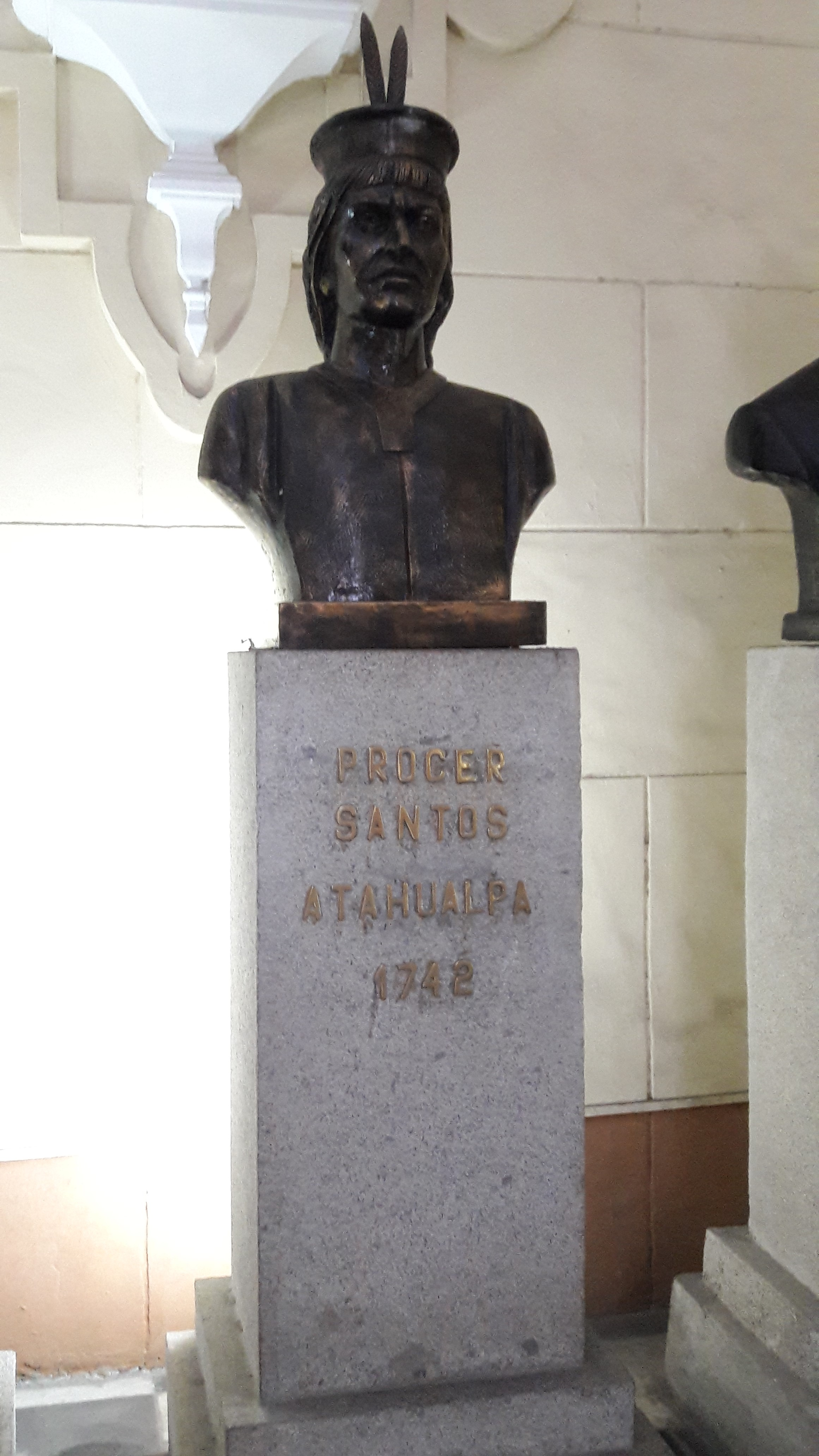 Prócer Santos Atahualpa 1742